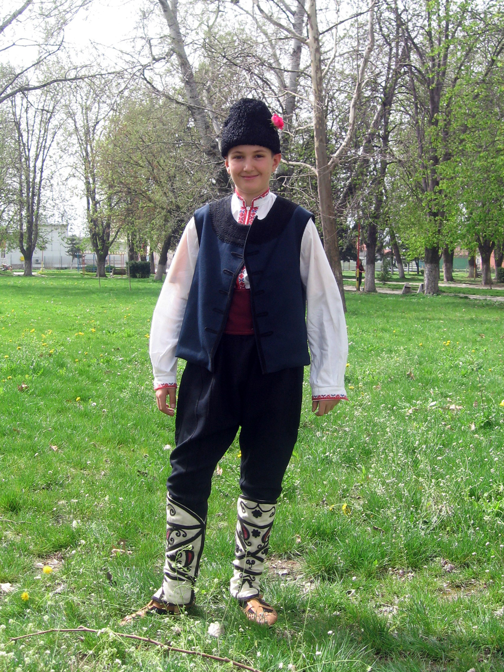 Момче в мъжка носия от село Габра, Софийска област